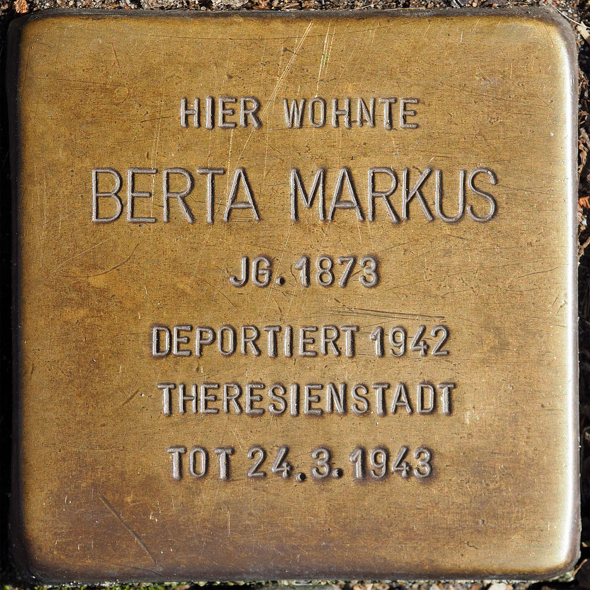 Stolpersteine MG: Markus, Berta